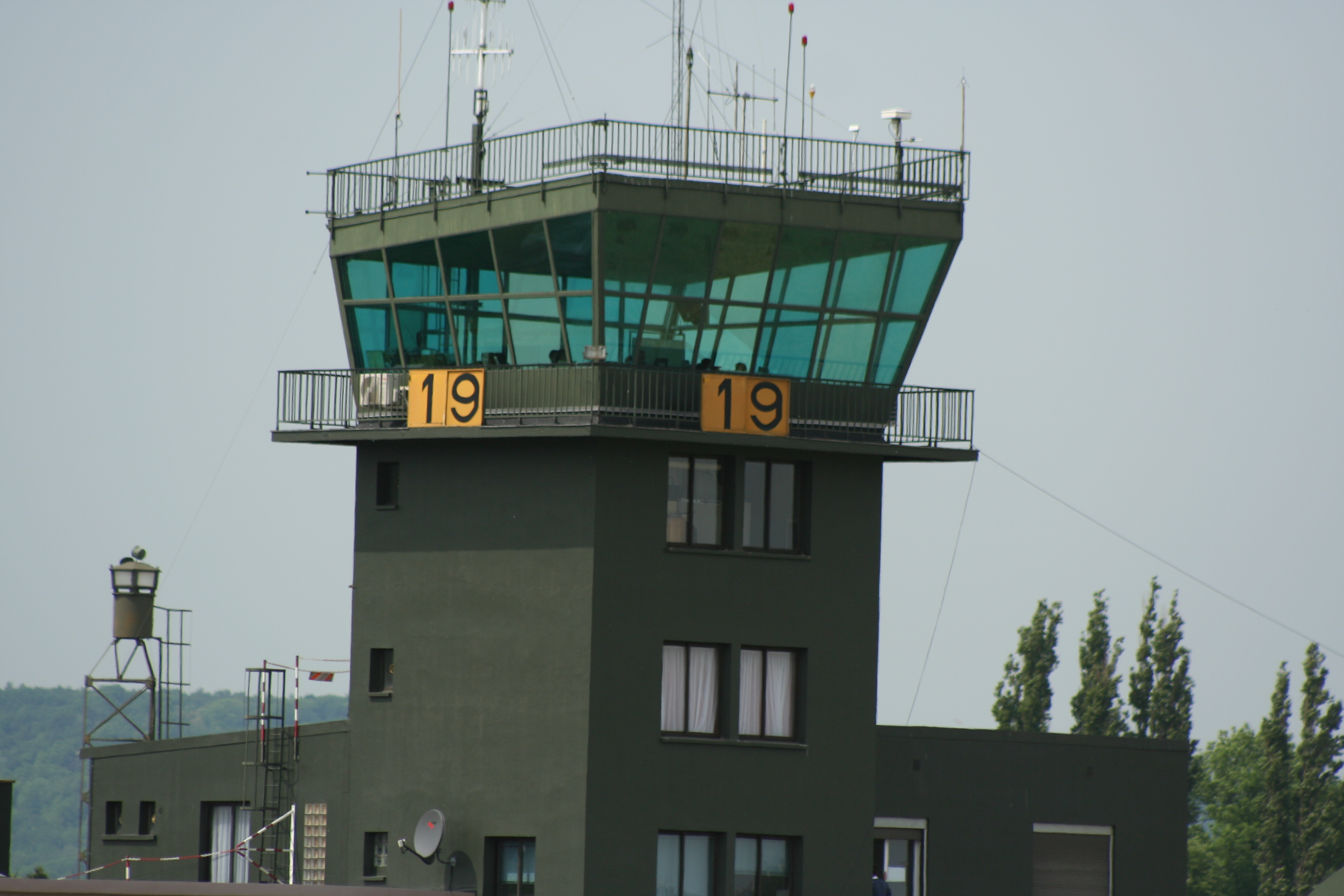 Tour de contrôle BA128 Metz-Frescaty